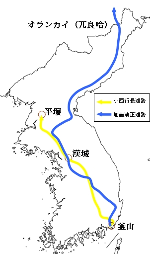 文禄の役のおける小西行長及び加藤清正の進路。利用者:tokugawaが『日本戦史朝鮮役』を参考にして作成